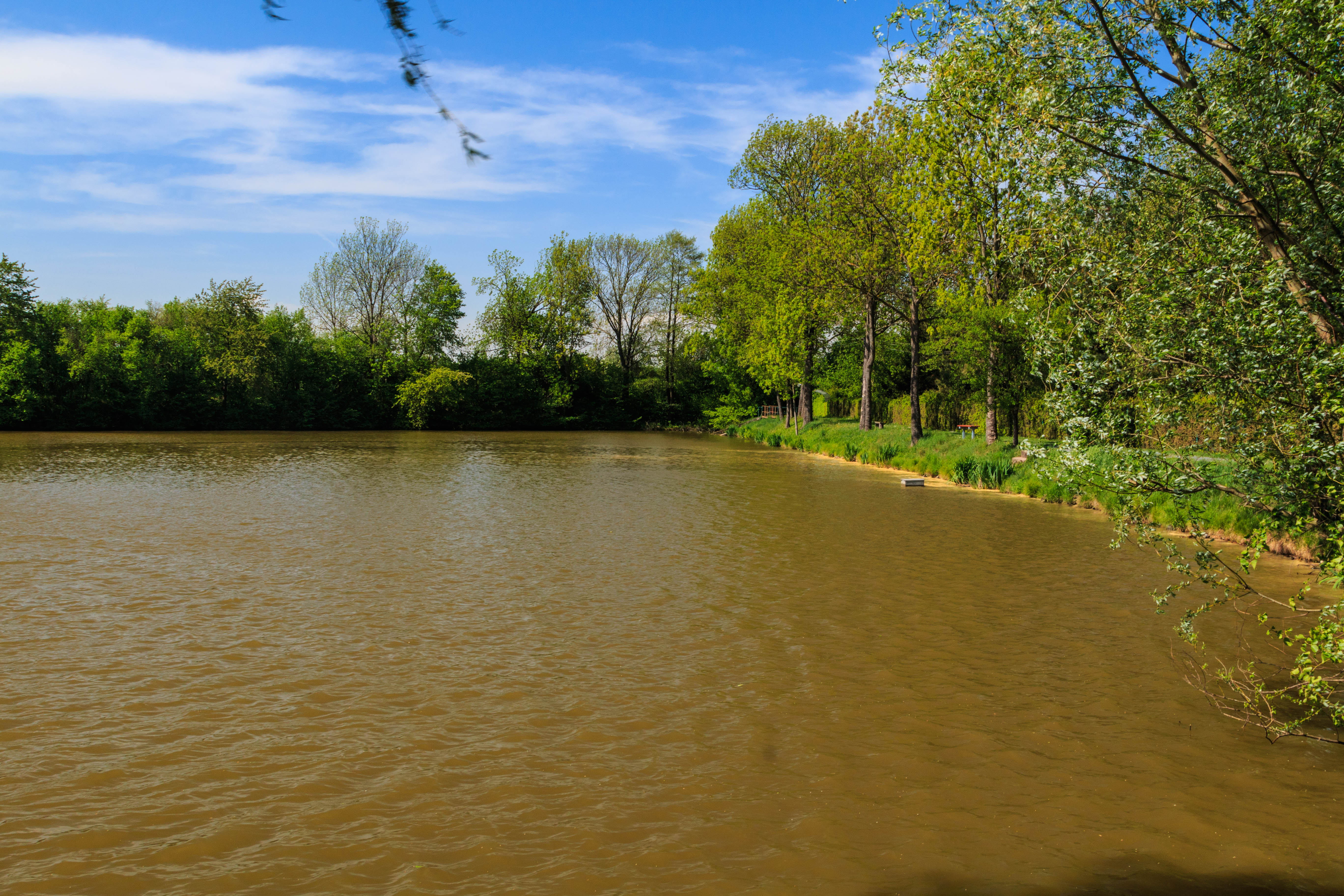 Pouchobradský rybník Project: Vodstvo